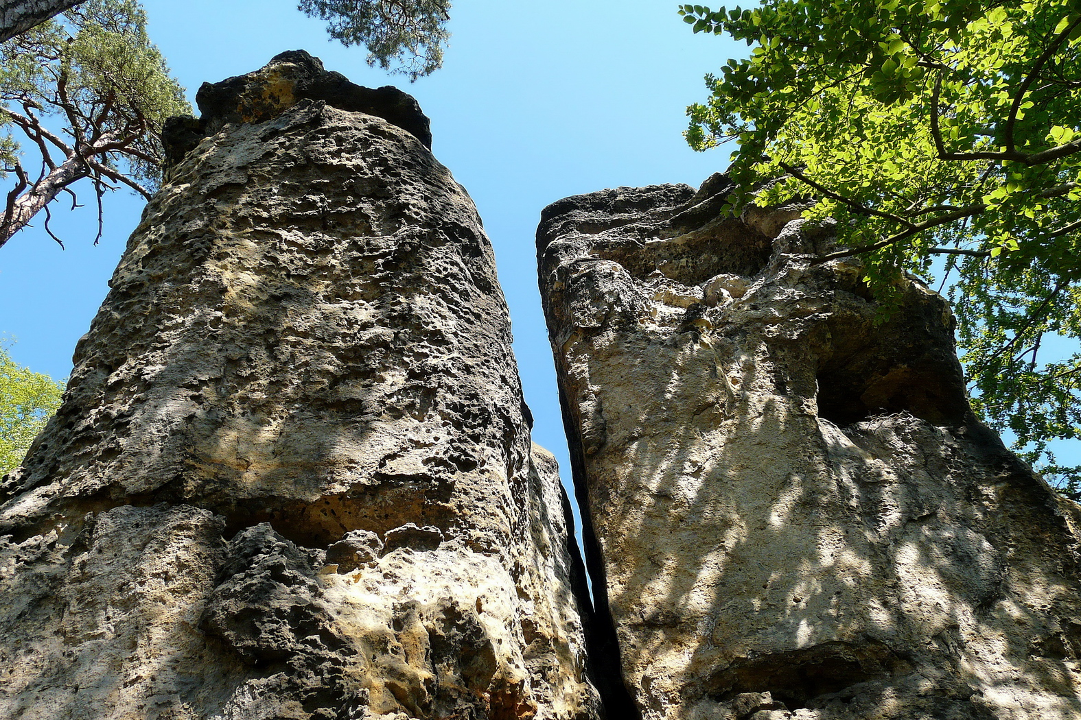 Havraní skála na vrchu Šroubený